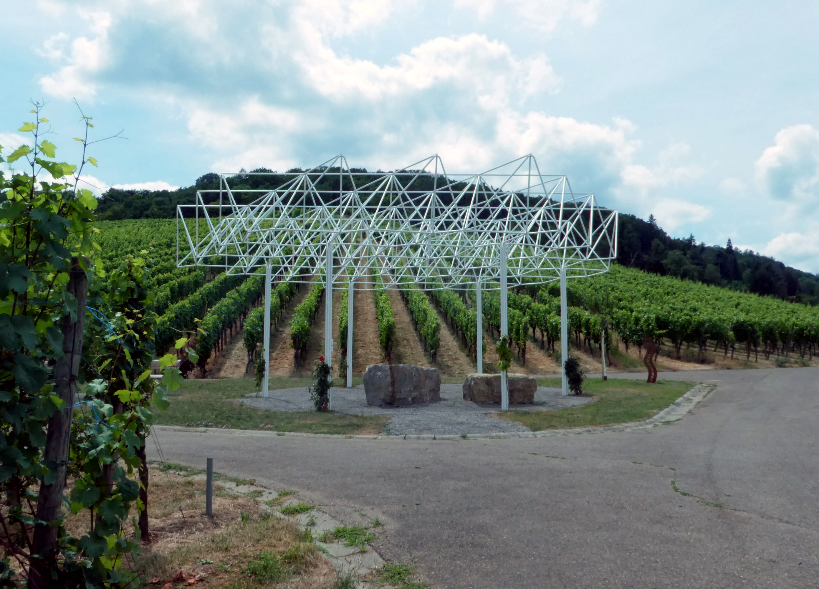 Fellbach - "Belvedere". Die Pergola entstand als Station 15 der "16 Stationen" der Remstal-Gartenschau 2019.